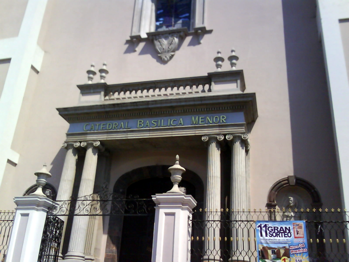 Catedral basilica menor.